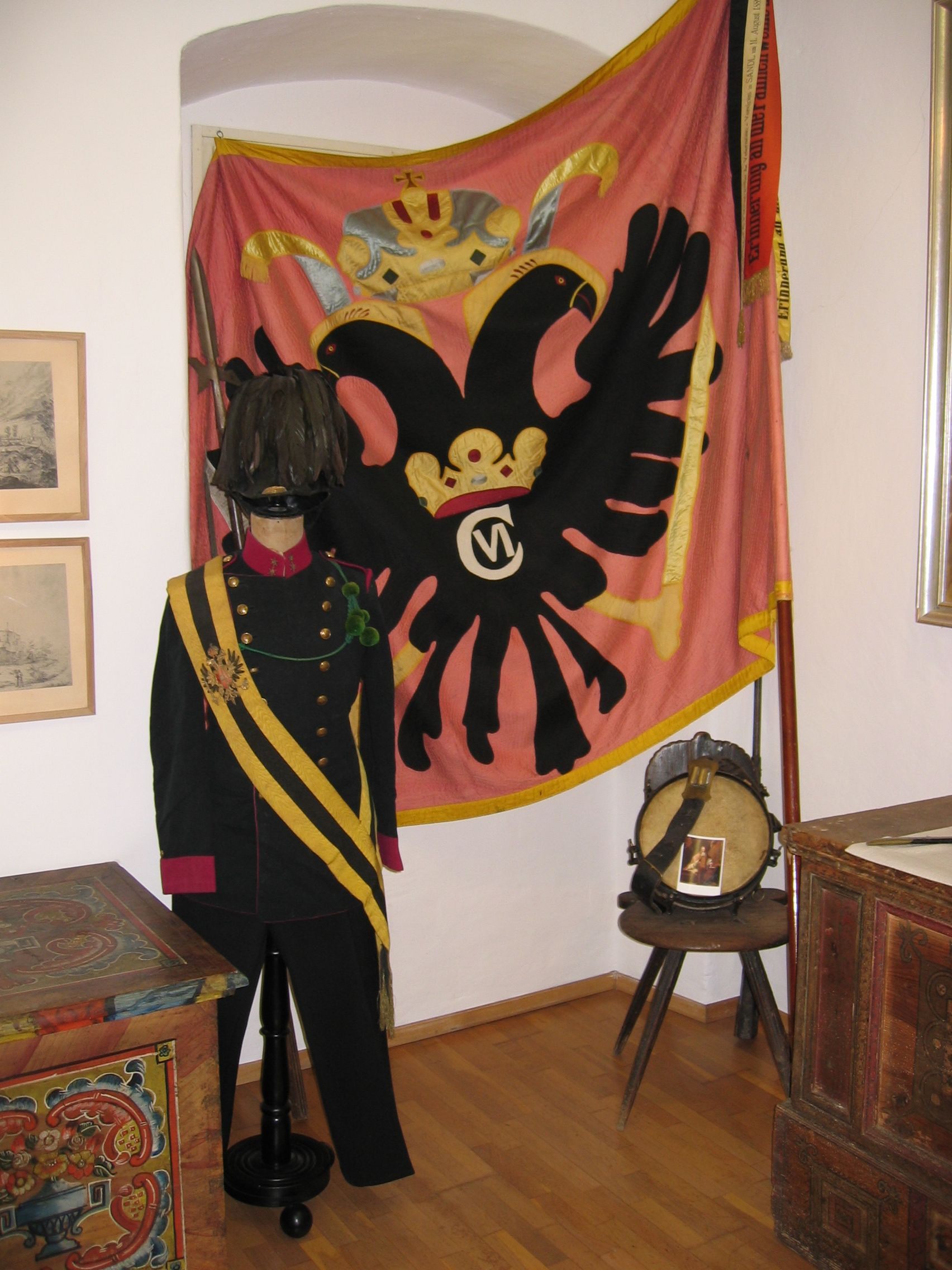 alte Bürgerkorpsuniform - Museumsbestand